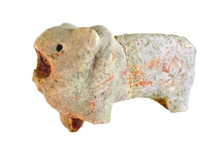 חורבת עוצה - צלמית של בעל חיים משכבה 14, כנראה אריה